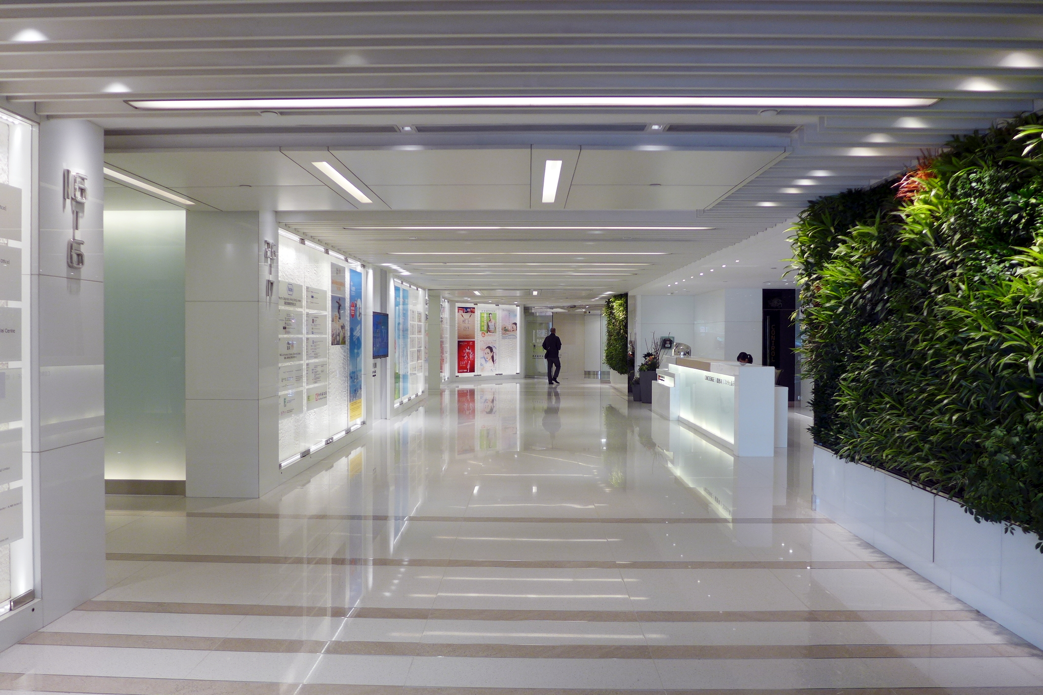 MetroPlaza Office Lobby